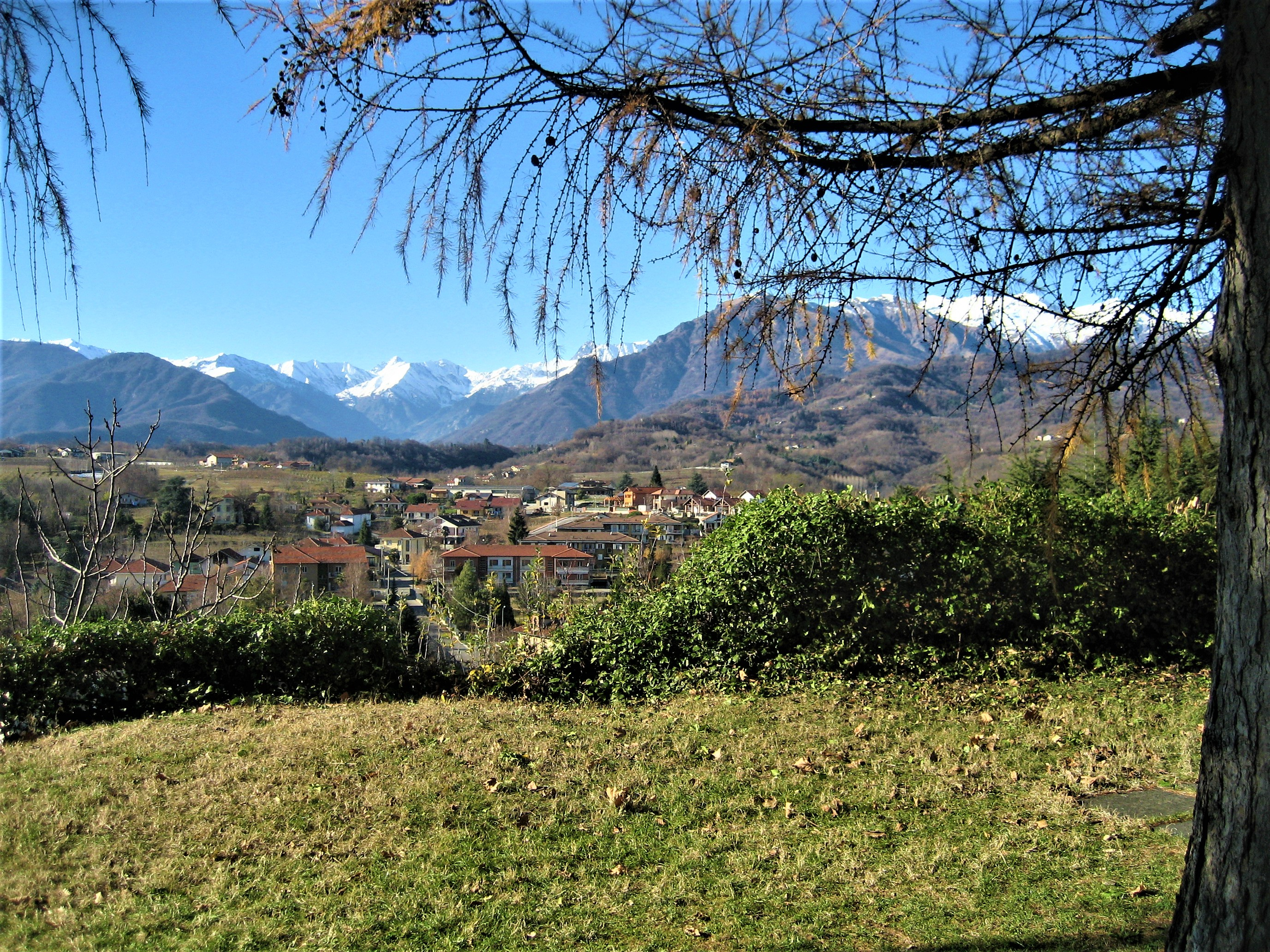 Landschaft Val Pellice